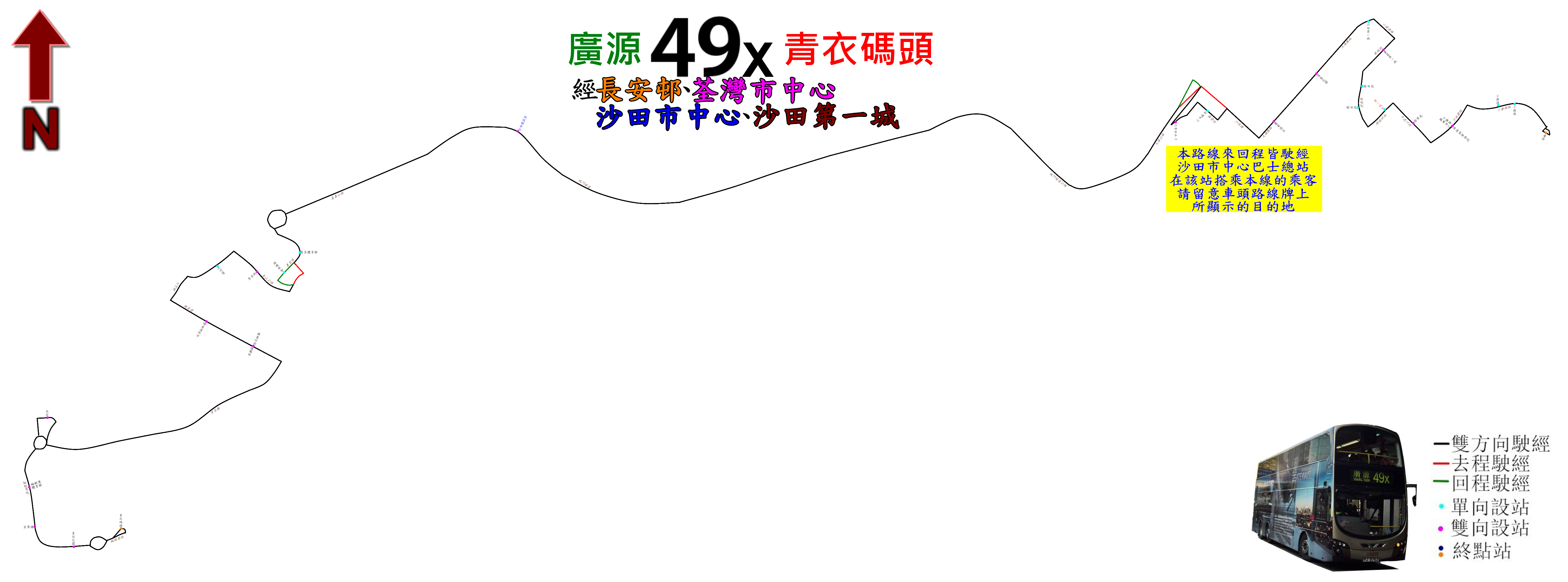 中文（香港）: 九巴49X線的走線圖